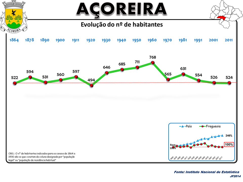 Evolução da População 1864 / 2011